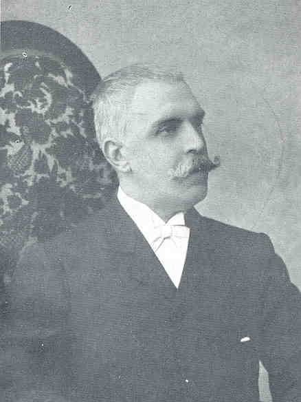 fotografia de Manuel González Prada